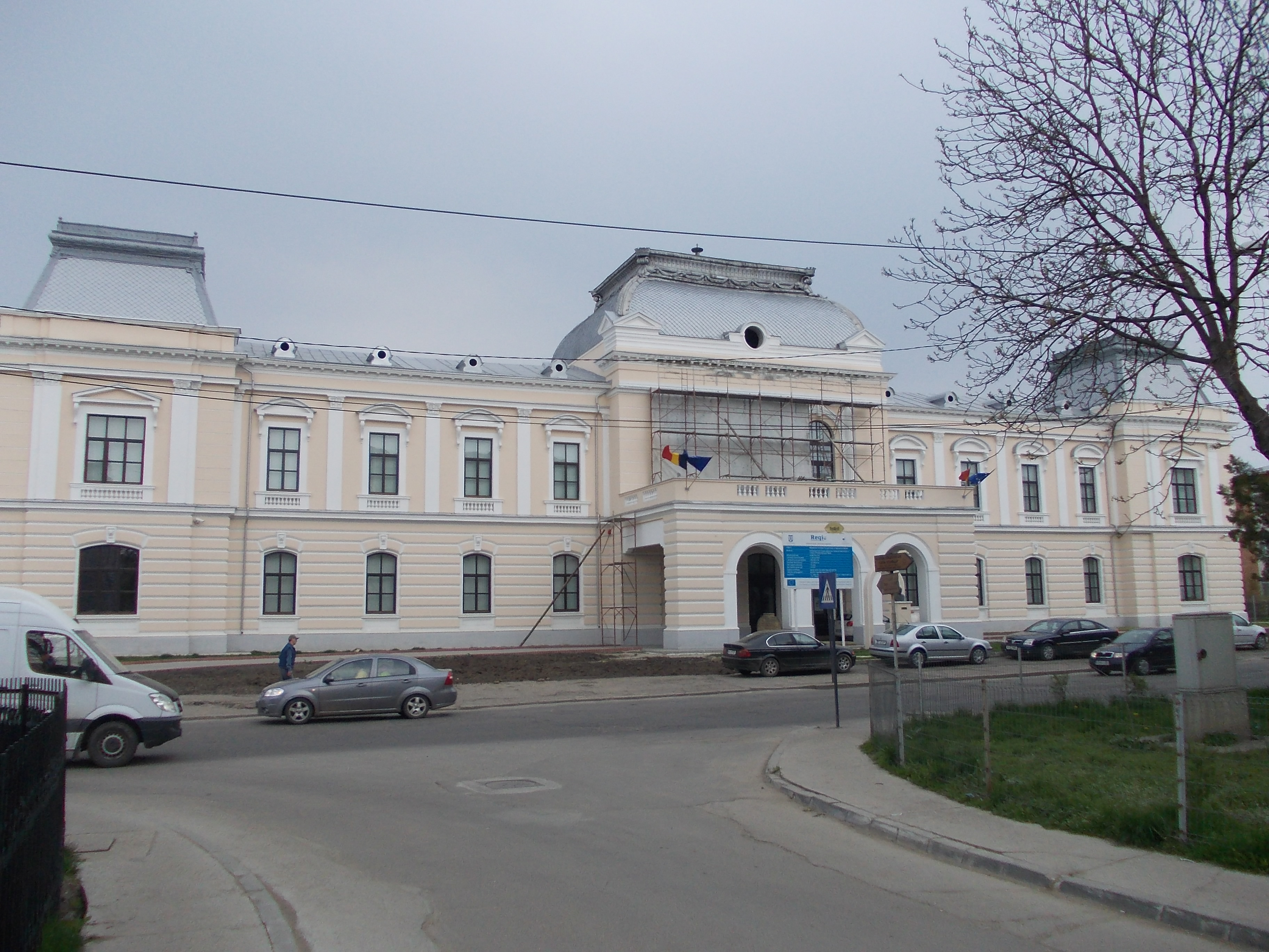 Palatul Administrativ și de Justiție al fostului județ Tutova, azi Muzeul „Vasile Pârvan” din Bârlad. Clădire monument-istoric ridicată în anul 1890.